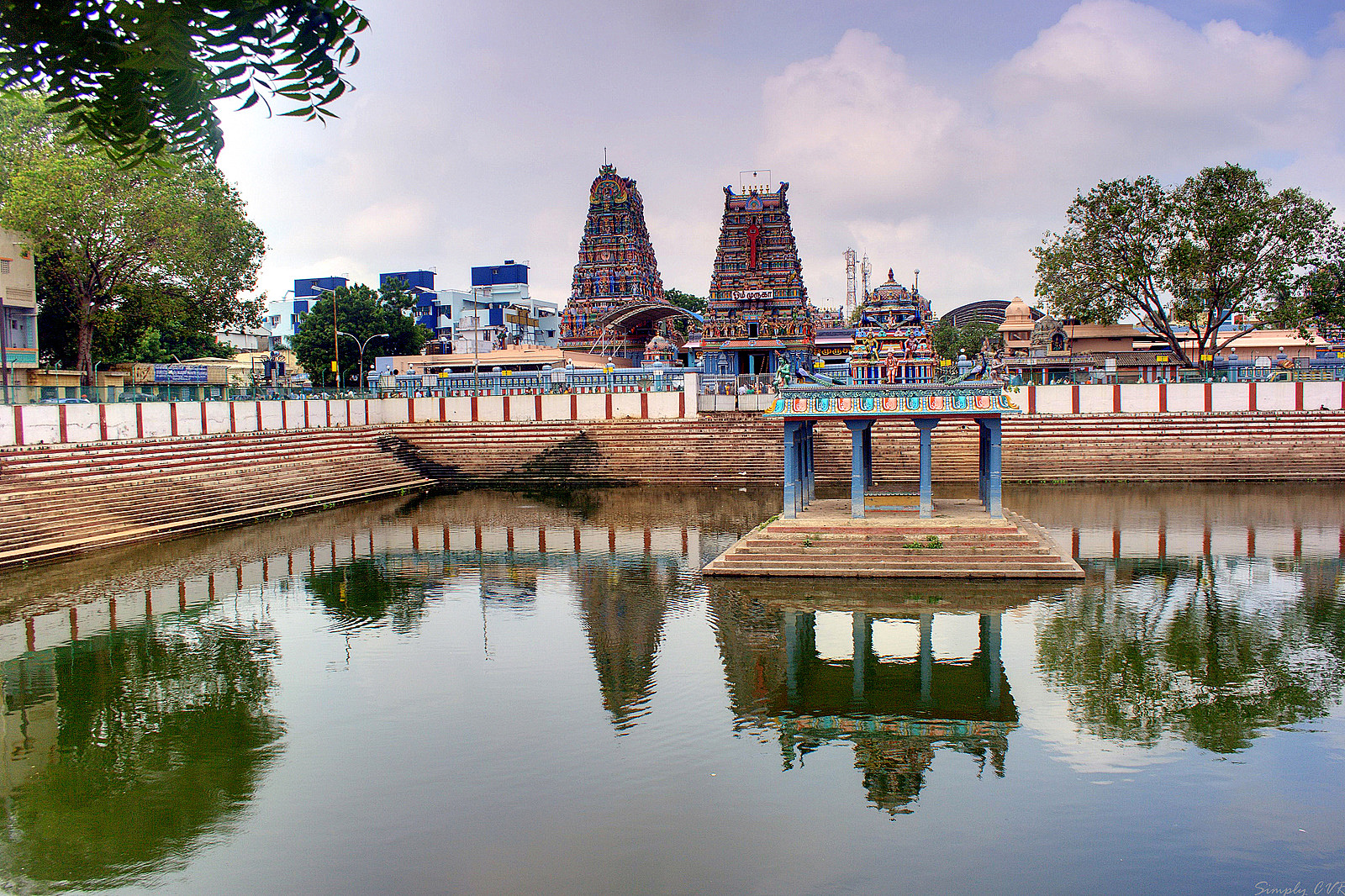 Vadapalani murugan temple tank